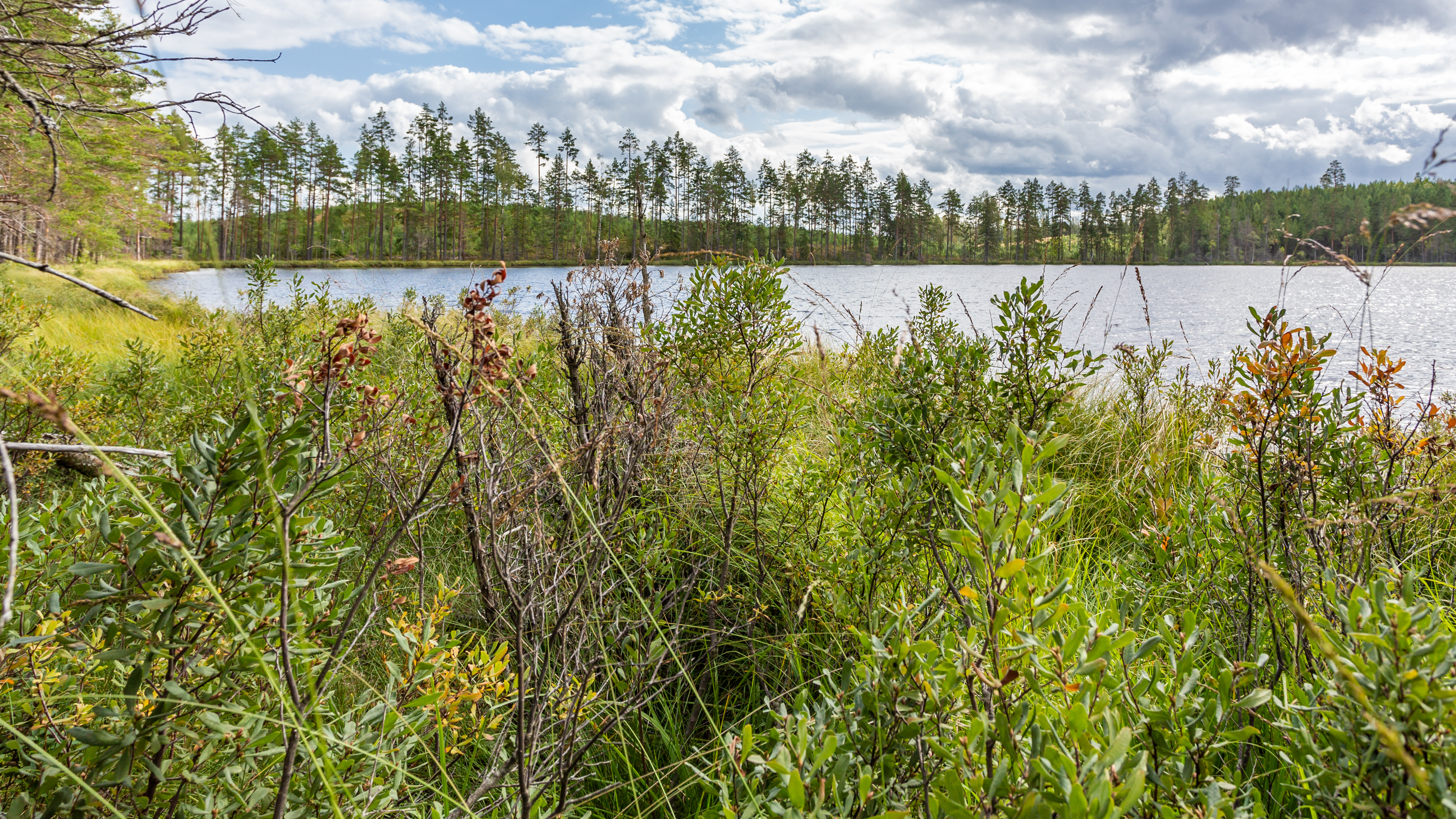 Sjön Källsinksjön, Hedemora kommun, Dalarnas län, Sverige